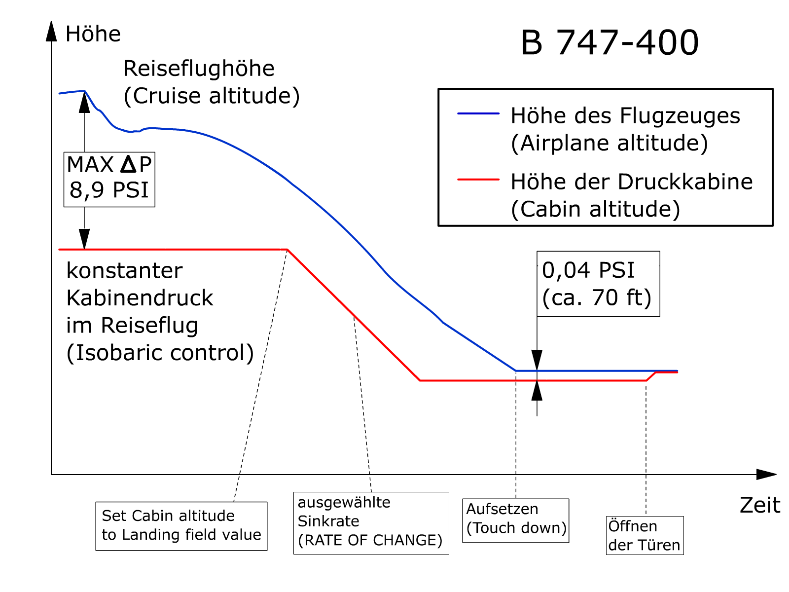 Kabinendruck und Außendruck während des Sinkfluges